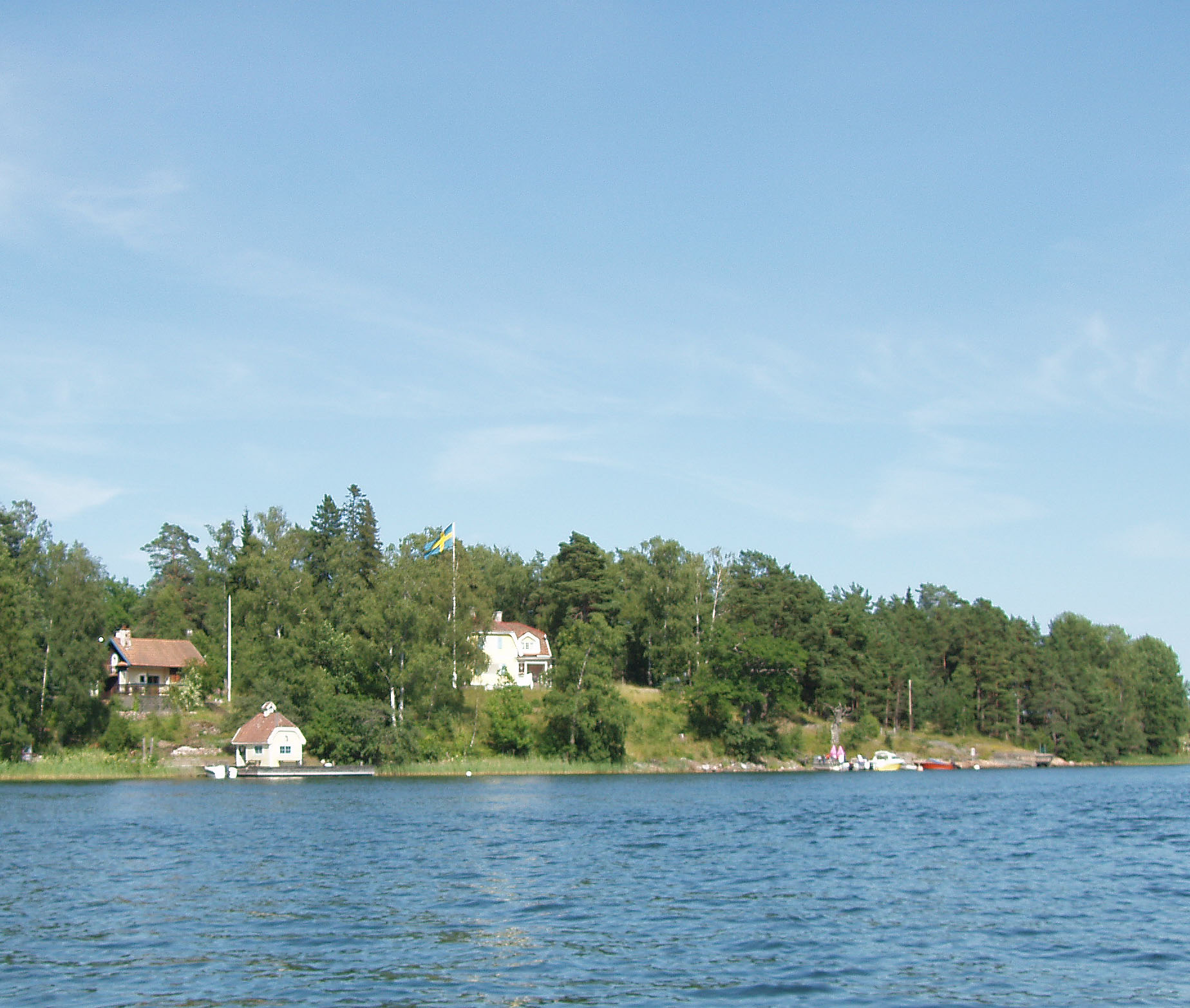 Familjen Björlings (Jussi Björling) sommarresidens på Siarö i Stockholms skärgård.